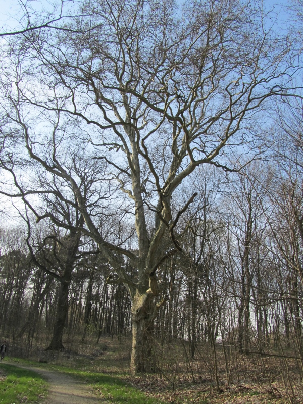 Zdjęcie drzewostanu w Paku w Jaknowicach